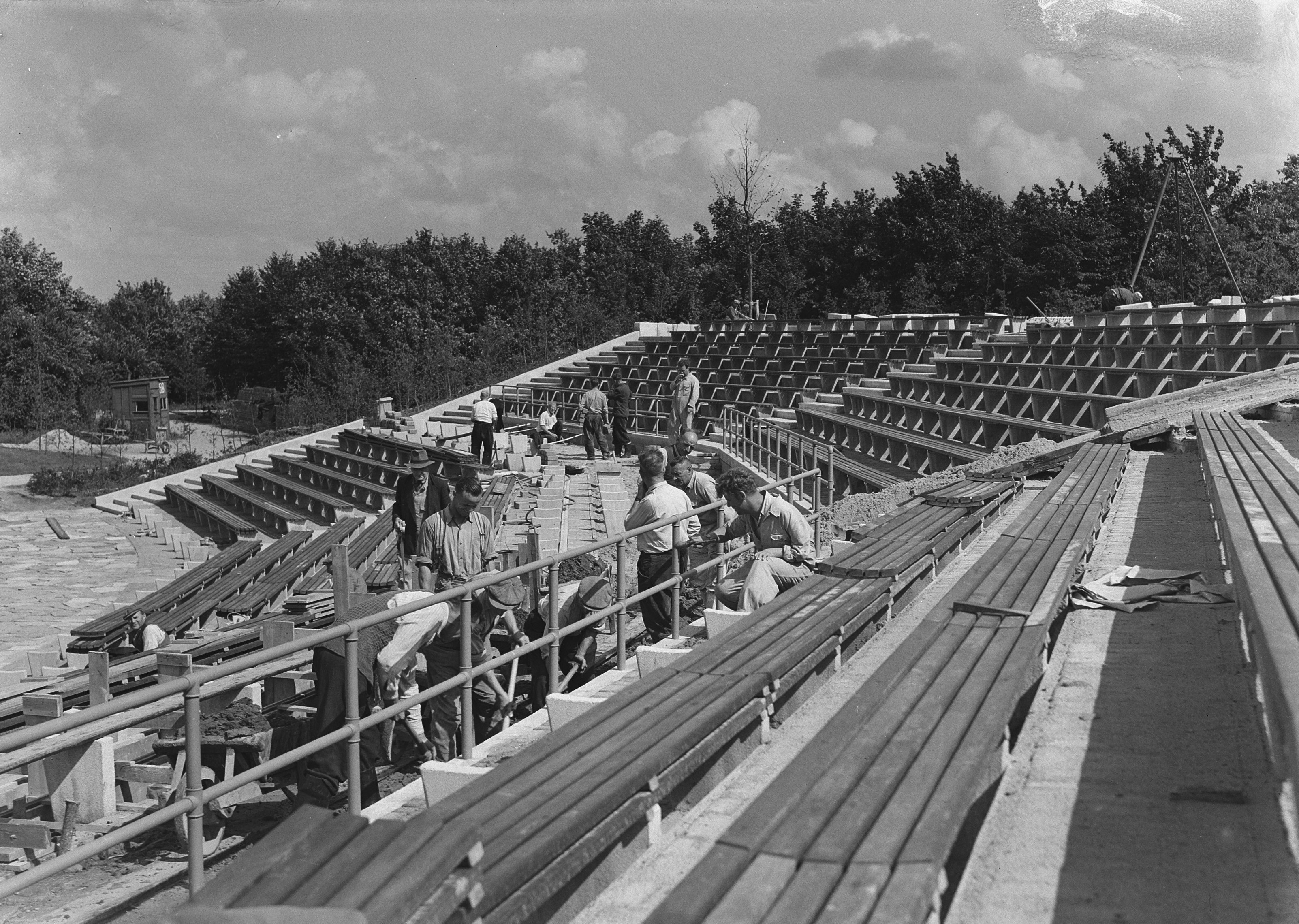 Collectie / Archief : Fotocollectie Anefo Reportage / Serie : [ onbekend ] Beschrijving : Aanbouw openluchttheater in Bosplan Amsterdam Datum : 9 juli 1953 Locatie : Amsterdam, Noord-Holland Trefwoorden : aanbouw, openluchttheaters Fotograaf : Rossem, Wim van / Anefo Auteursrechthebbende : Nationaal Archief Materiaalsoort : Glasnegatief Nummer archiefinventaris : bekijk toegang 2.24.01.09 Bestanddeelnummer : 905-8242 Reacties Geplaatst door Amsterdammertje op 01 november 2015 - 14:57. Amsterdamse Bos NB. In de volksmond heel lang Bosplan genoemd. Het plan voor de aanleg van een bos bij Amsterdam ontstond in de jaren '30 van de vorige eeuw en werd uitgevoerd in het kader van de Werkverschaffing. (werk voor langdurig werklozen)